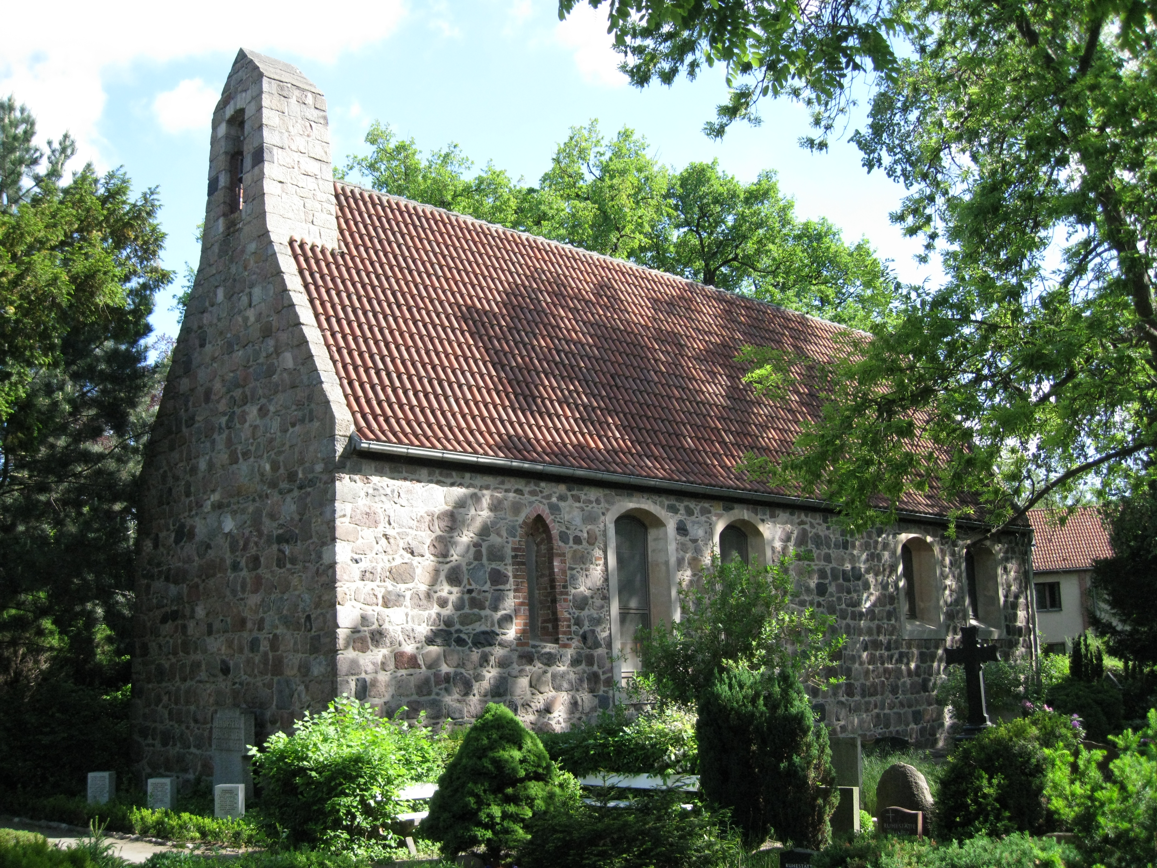 Dorfkirche Giesensdorf von Südwesten